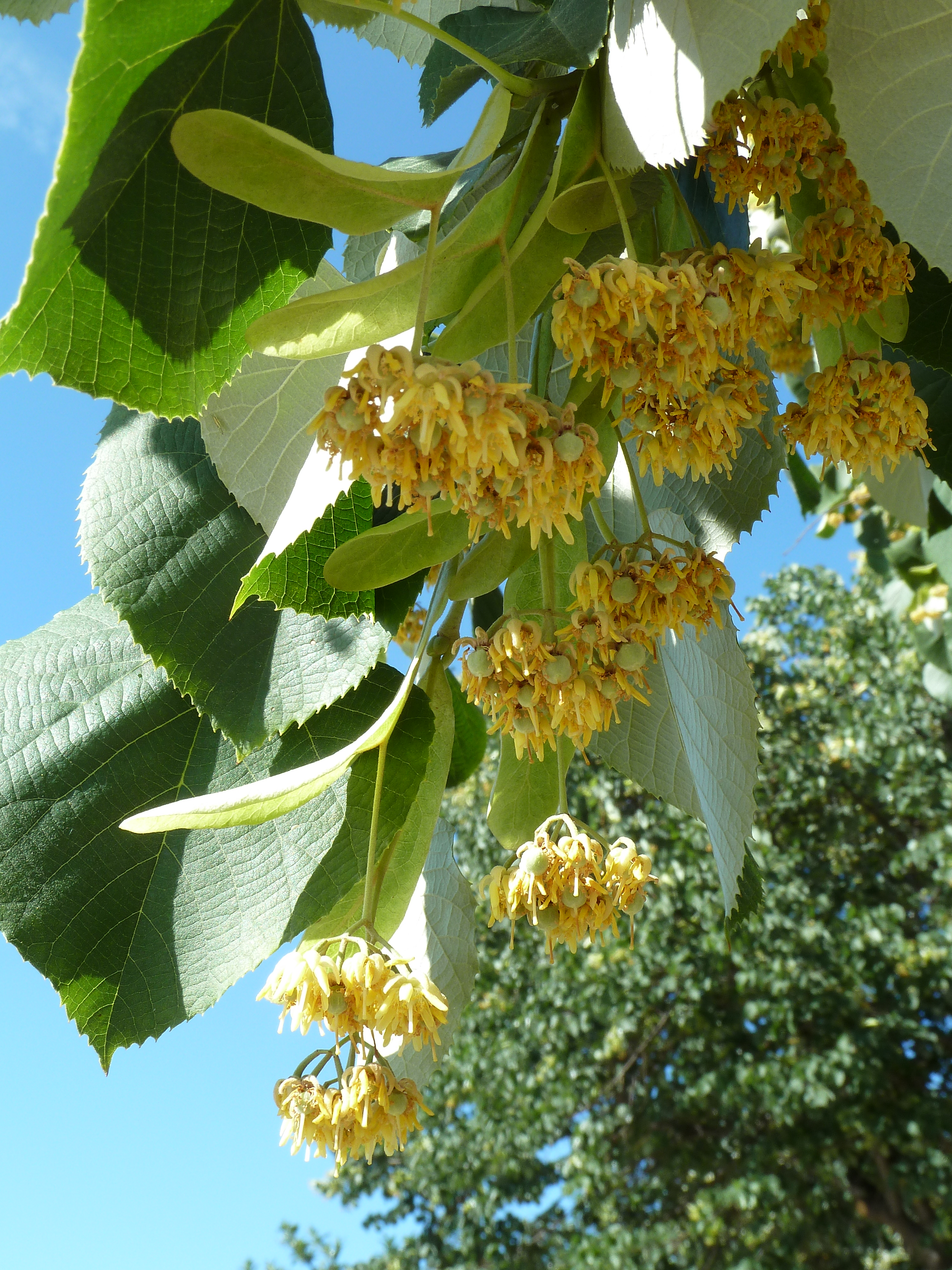 Tilia platyphyllos : Inflorescencias en vía de fructificación - Ribera Este de los estanques, Parque del Planetario - Madrid.